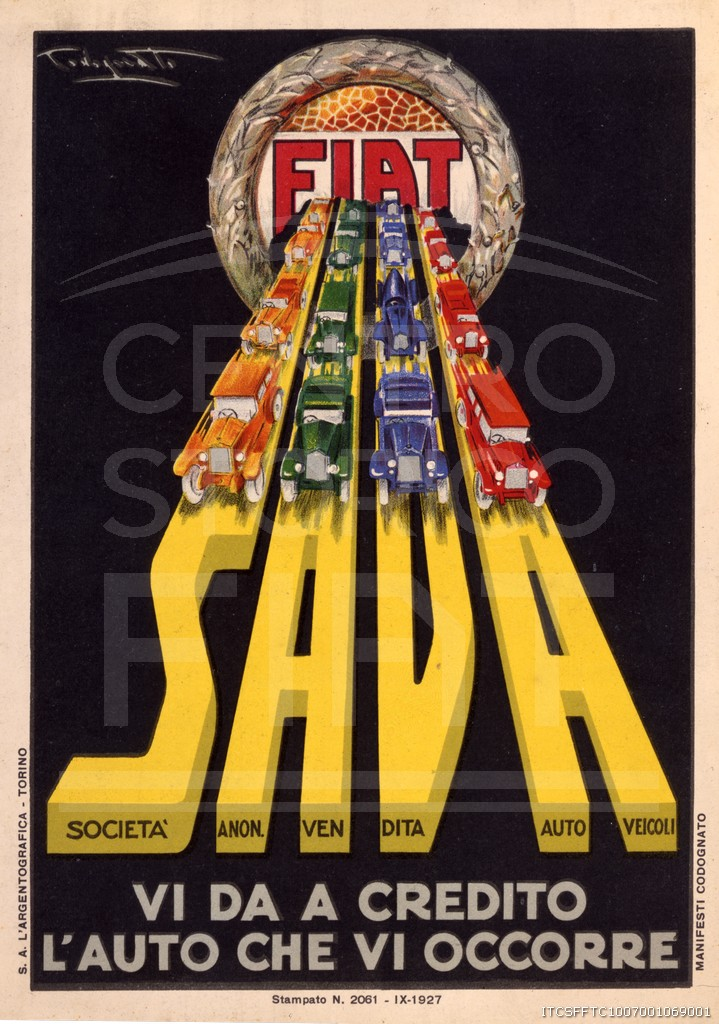 Codognato Fiat Sava